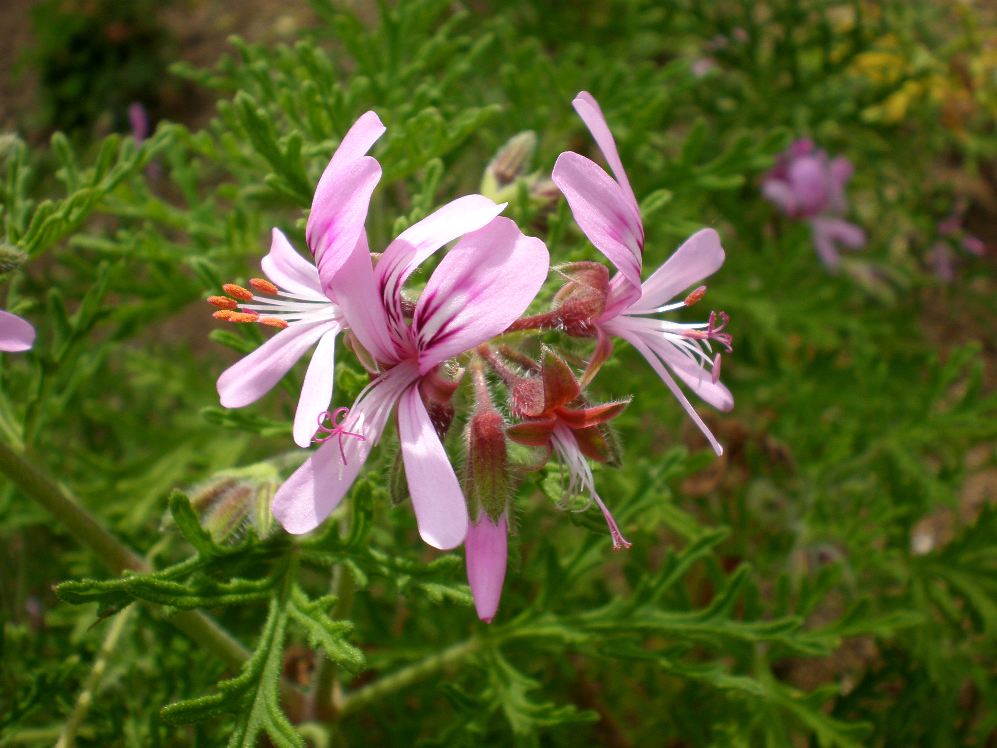 Jardín Botánico de Barcelona.